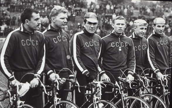 Велогонка Мира